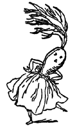 Pietruszka tańczy